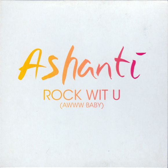 Alternativt singelomslag till låten "Rock wit U (Awww Baby)" med R&B-sångerskan Ashanti